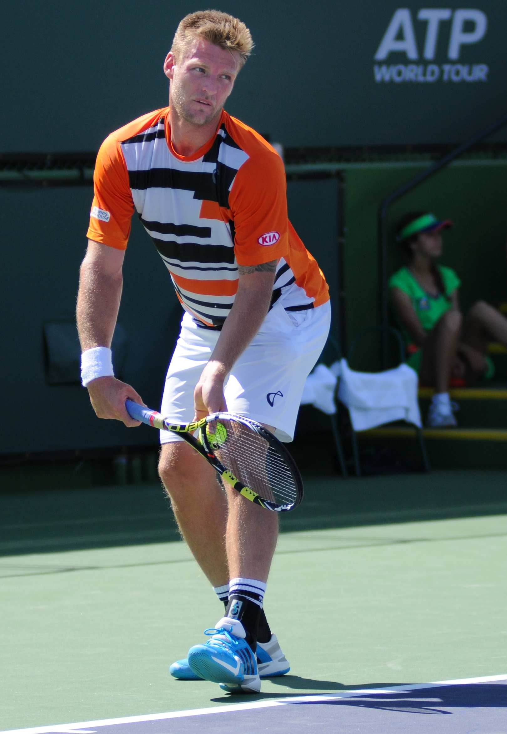 2014 BNP Paribas Open